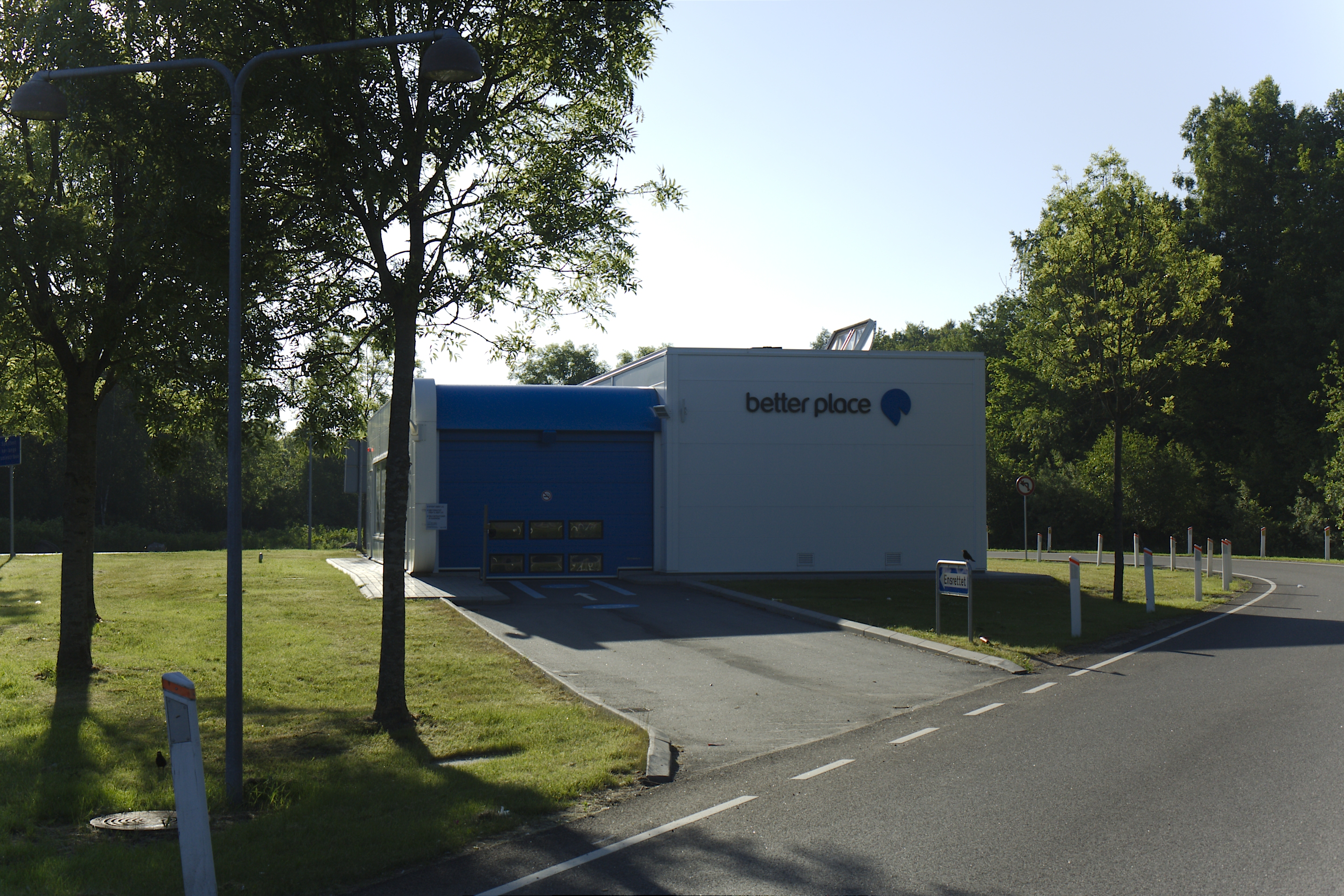 Batteriskiftestation (better place) på Fyn